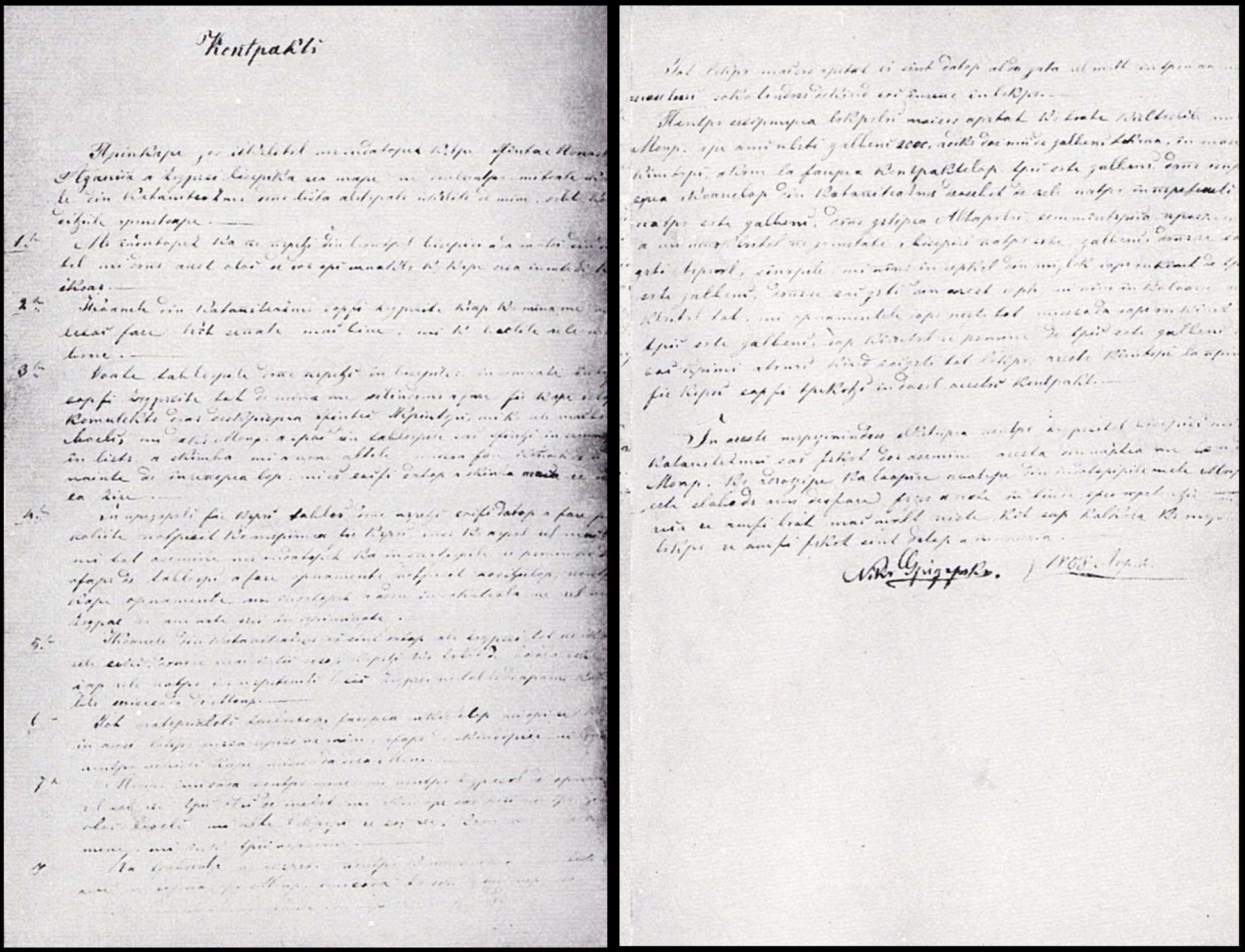 Nicolae Grigorescu - Contractul pentru zugravirea Mănăstirii Agapia - 2 aprilie 1858